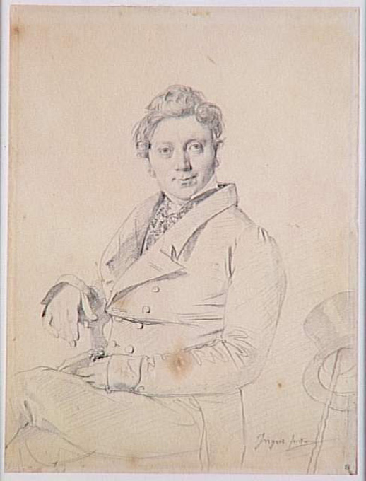 Portrait of French engraver François Forster (1790-1872). Musée Bonnat, Bayonne, France.